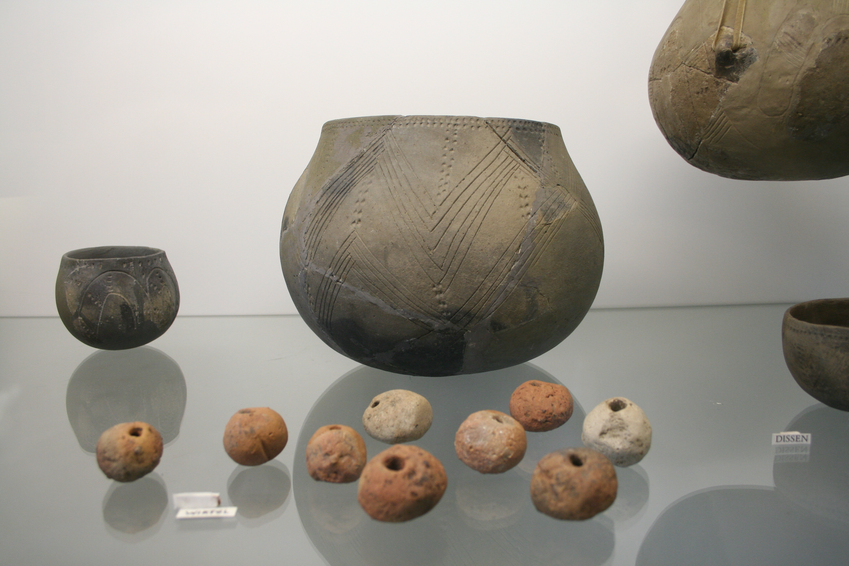 Regionalmuseum Fritzlar